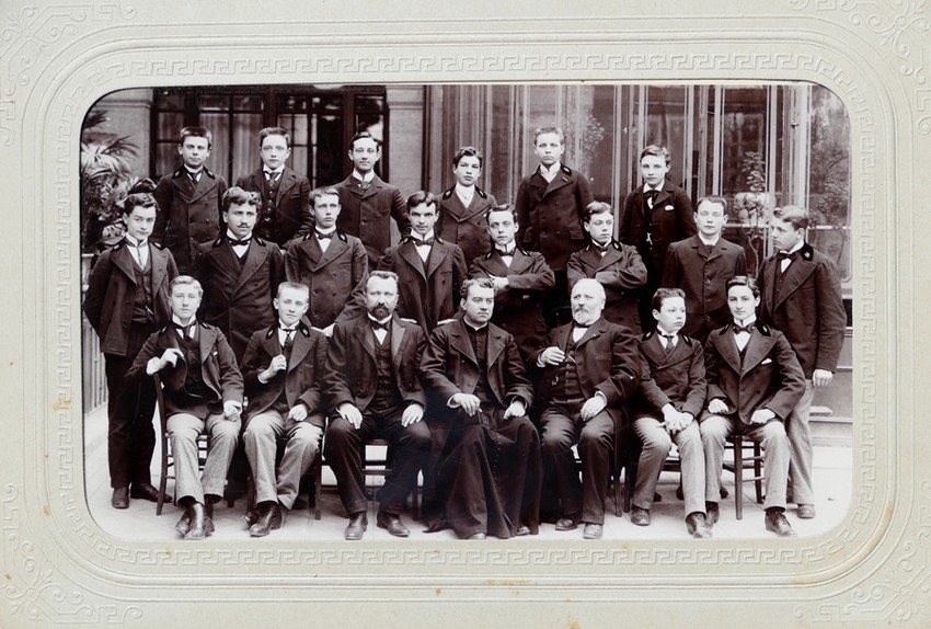 Une classe de l'Institution Sainte-Croix de Neuilly, vers 1903. Abbé Hermeline. 2e rangée, 4e à droite, Pierre Renoir. Photographe De Jongh frères, Neuilly. Collection personnelle.